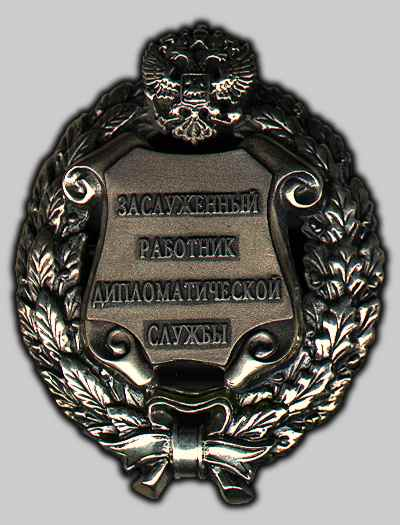 Заслуженный работник дипломатической службы Российской Федерации